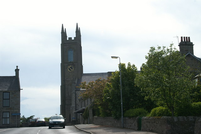 St Kane's Church, New Deer, Aberdeenshire